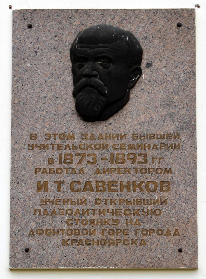 Памятная доска о работе И.Т. Савенокова директором учительской семинарии г. Красноярска